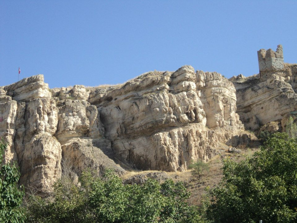 Tarihi Kemah Kalesi